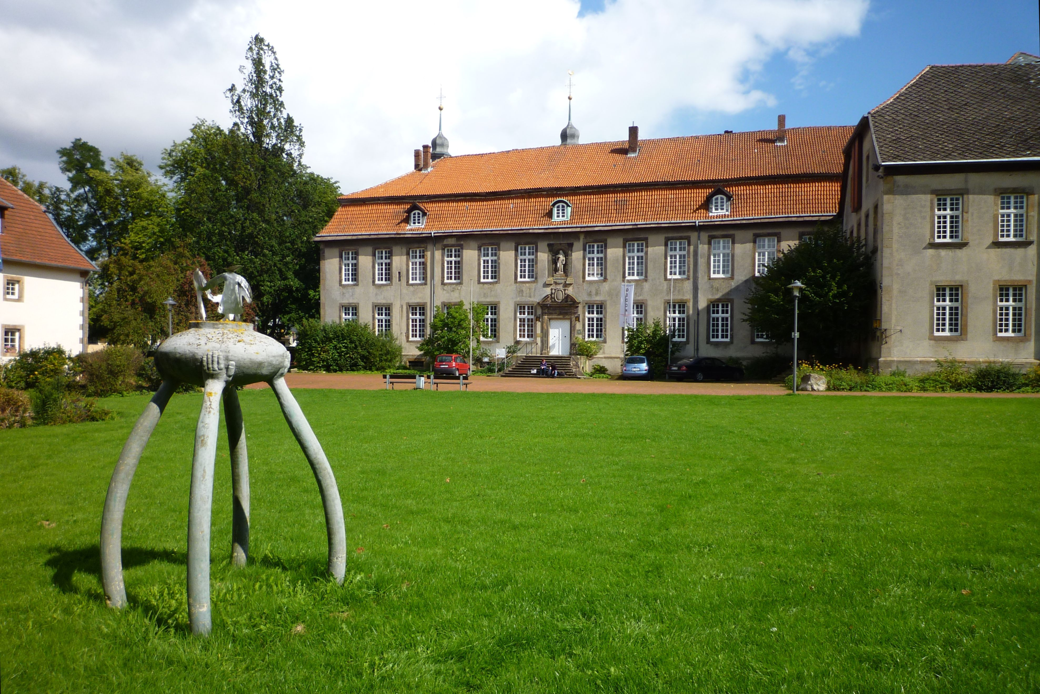 Willebadessen - Ehemaliges Benediktinerinnenkloster ab 1149, Skulptur